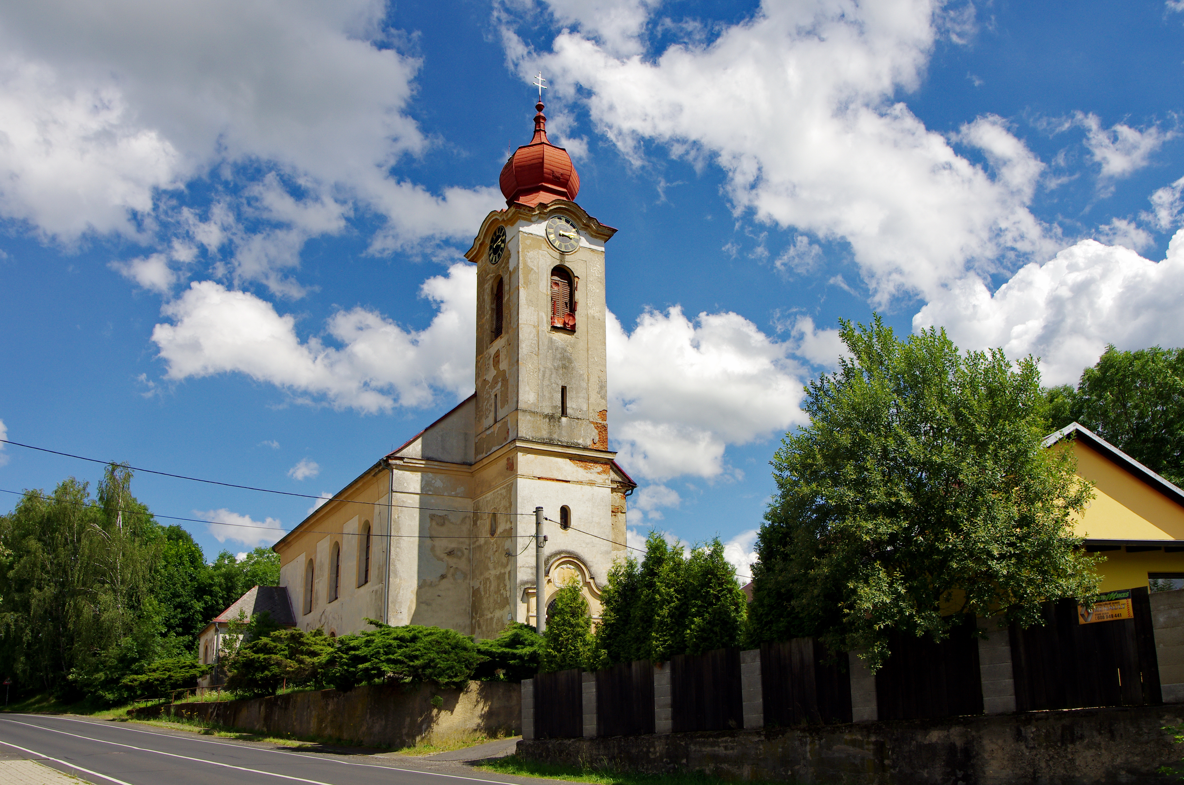 Staré Sedlo, kostel Nejsvětější Trojice, okres Sokolov